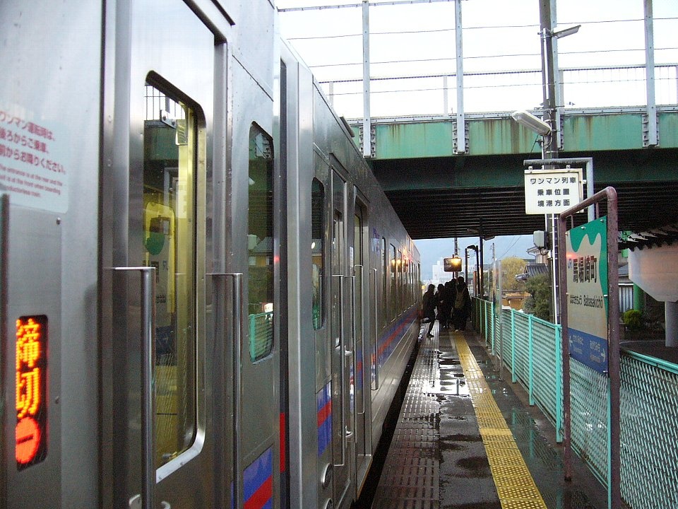 境線 馬場崎町駅